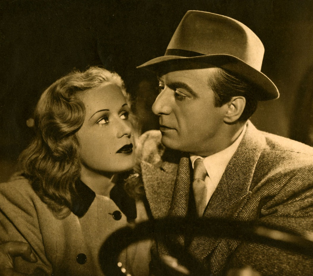 Vera Carmi e Fosco Giachetti nel film Labbra serrate (1942).